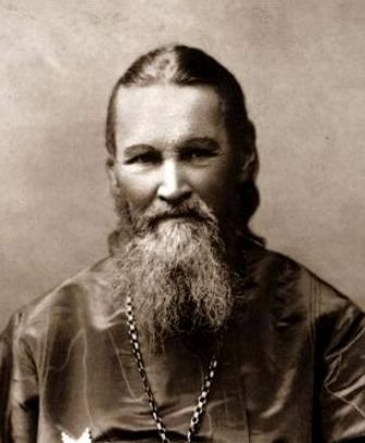 Русский православный священник Иоанн Кронштадтский (1829-1908)